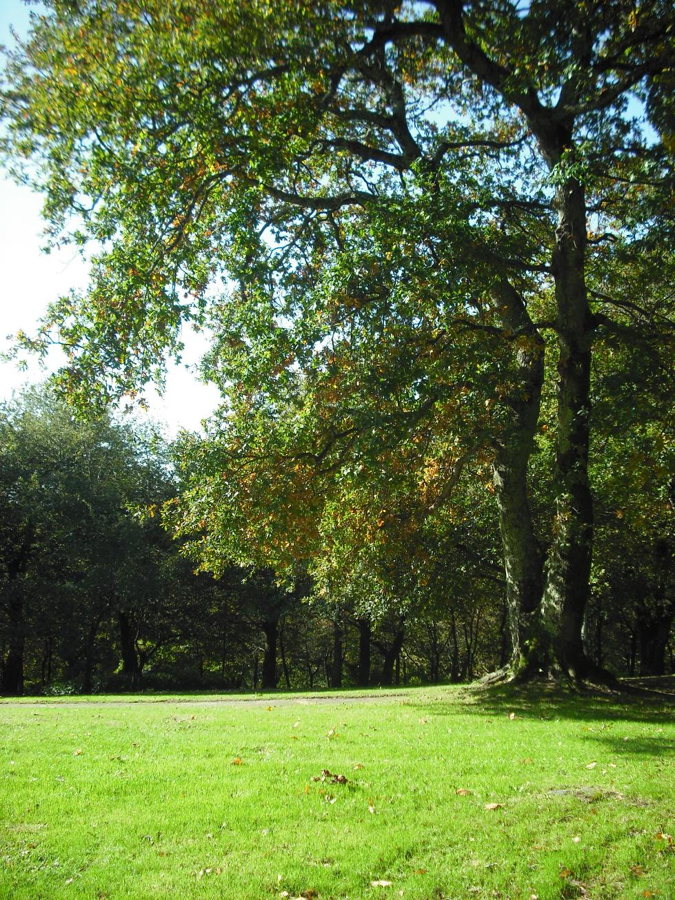 Robledo del Parque de Bonaval de Santiago de Compostela.